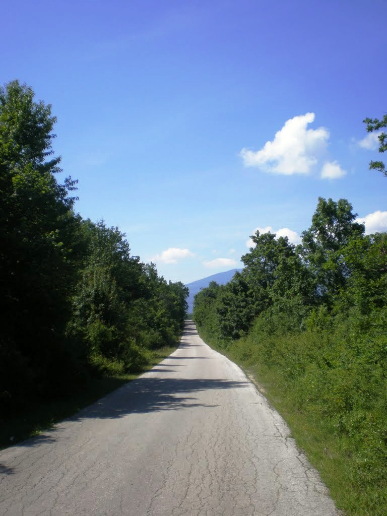 Put prema selu Trijebovo, opština Mrkonjić Grad.